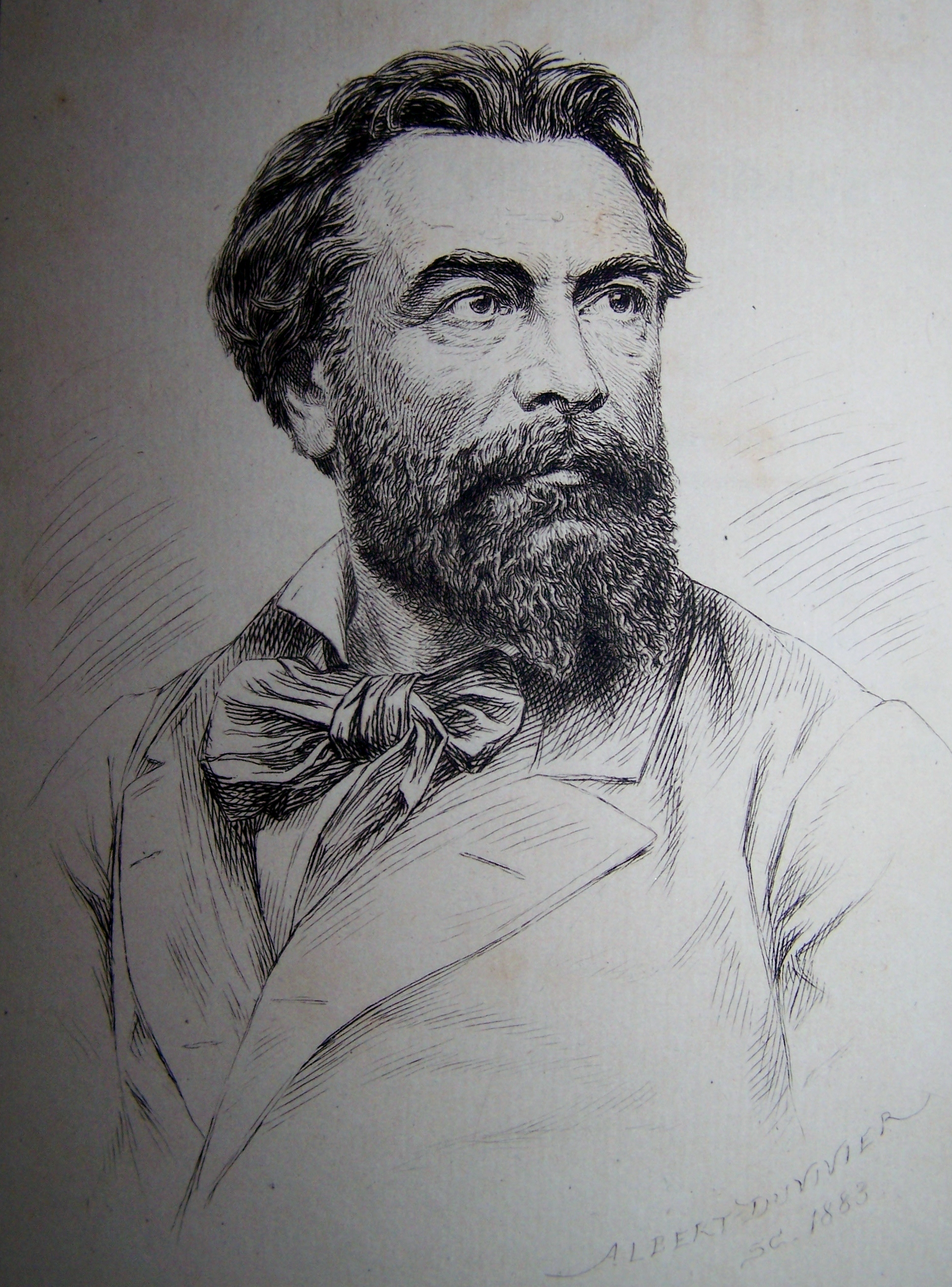 Gravure datée de 1883 du poète français Louis de Courmont d'Albert Duvivier parue dans le recueil de poésies de Louis de Courmont Feuilles au vent paru en 1884.